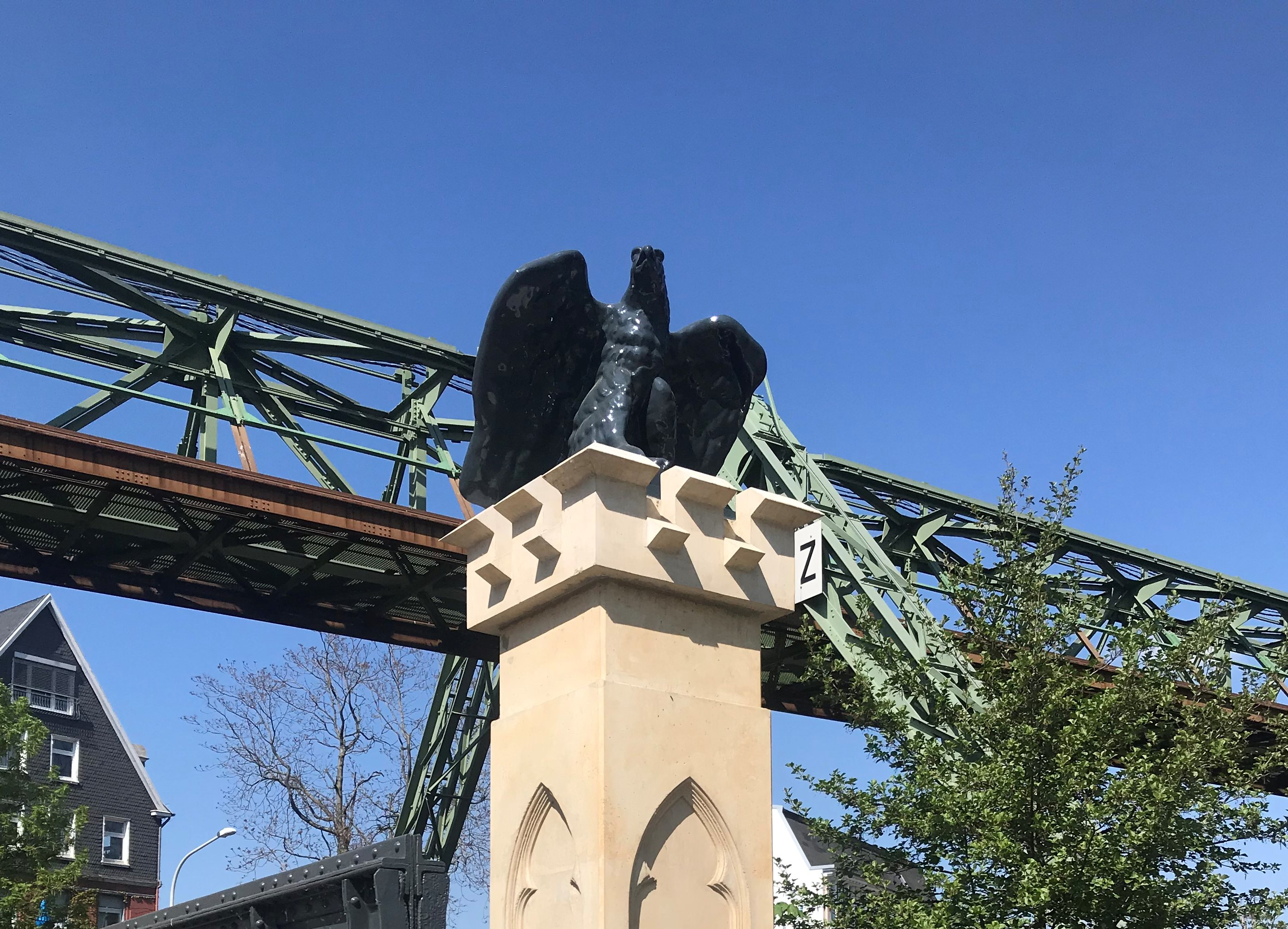 Neu hinzugefügte Adlerfiguren an den Pfeilern der Adlerbrücke, Barmen